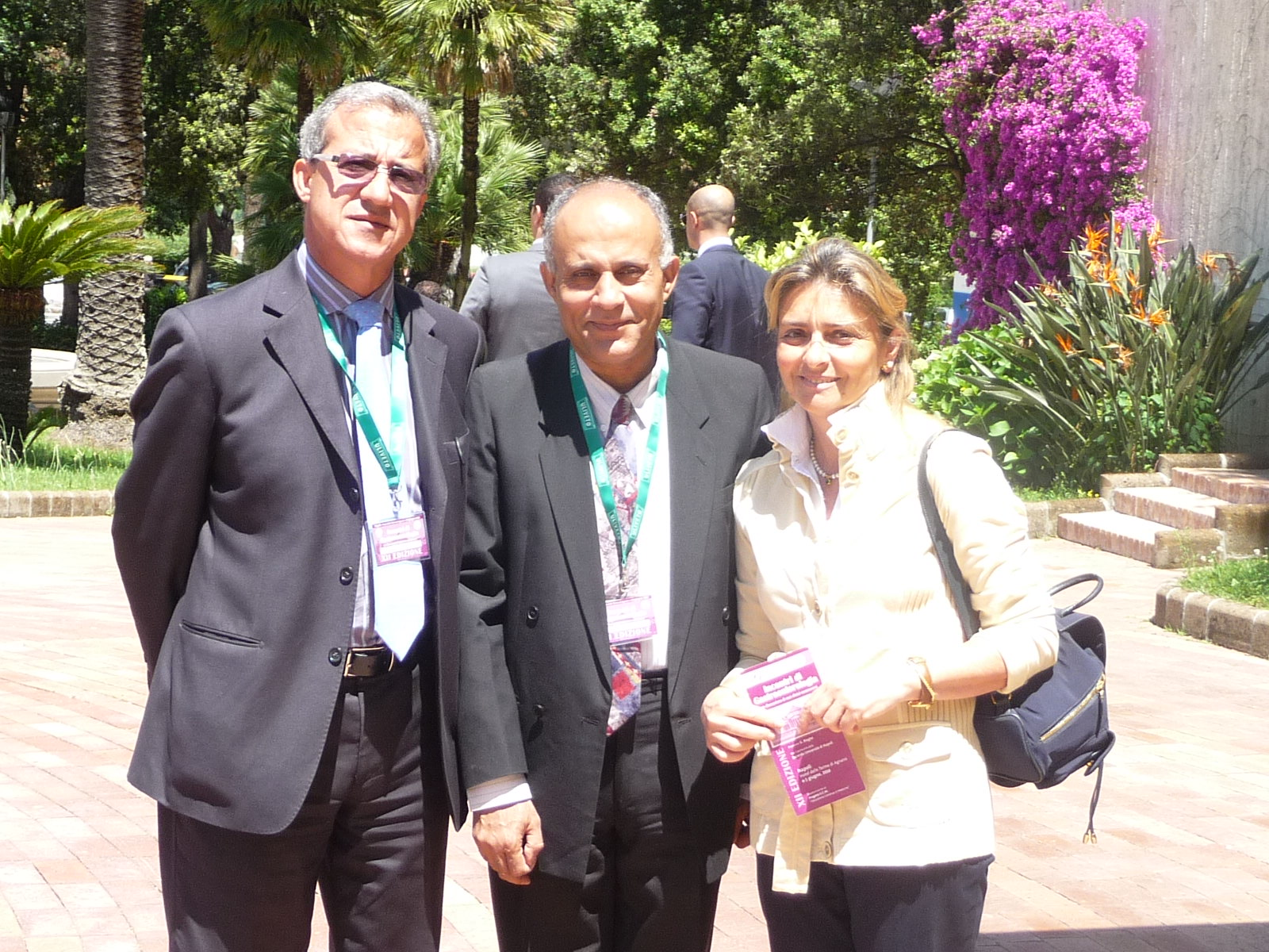 حضور مؤتمر الجهاز الهضمى فى مدينة نابولى بايطاليا